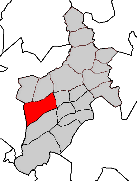 Situación da parroquia de Montouto no concello de Abegondo